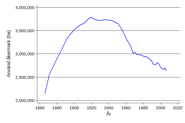 Total jordbruksareal i hektar för åren 1866 till 2007 i Sverige.